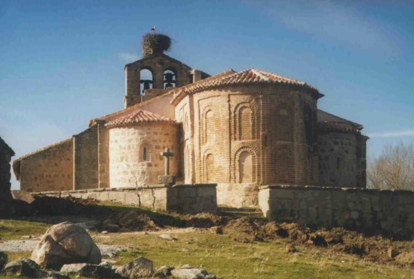 IGLESIA DE NARROS DEL PUERTO (ÁVILA; ESPAÑA)